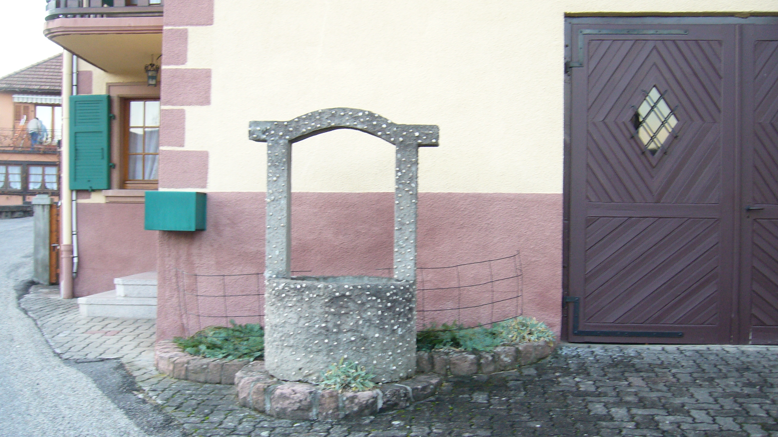 Ancienne fontaine à Triembach-au-Val